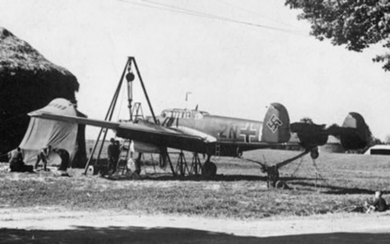 A German Messerschmitt Me 110 fighter of Zerstörergeschwader 76 (ZG 76, 76th Destroyer Wing).